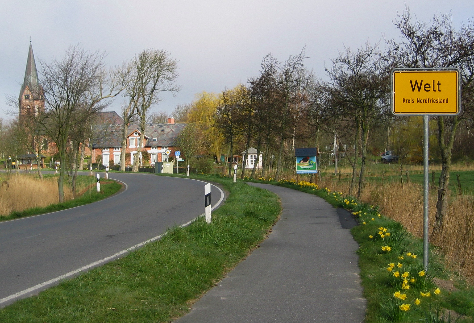 Welt, Ortseingang, Kirche St. Michael (links)